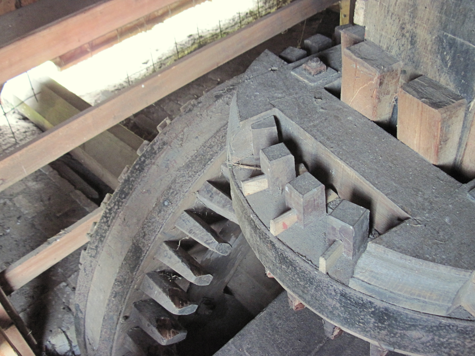 Himriksmole, Tietjerk